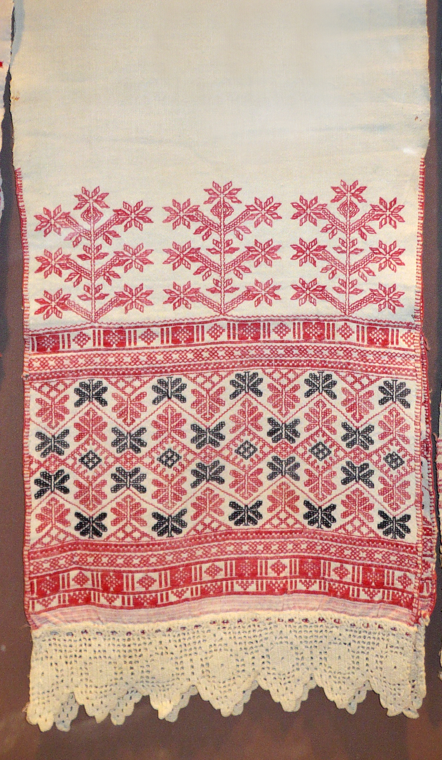 Рушник белгородский. Выставки "Ткачество" в Белгородском музее народной культуры. 26 марта 2008 года.